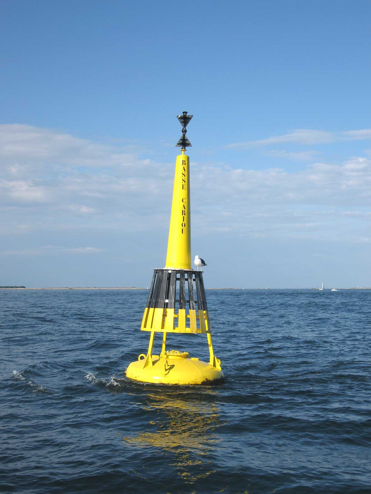 Description : Balise Cardinale Ouest Place : Lorient, Bretagne, France Date : 2006 Auteur : Pline